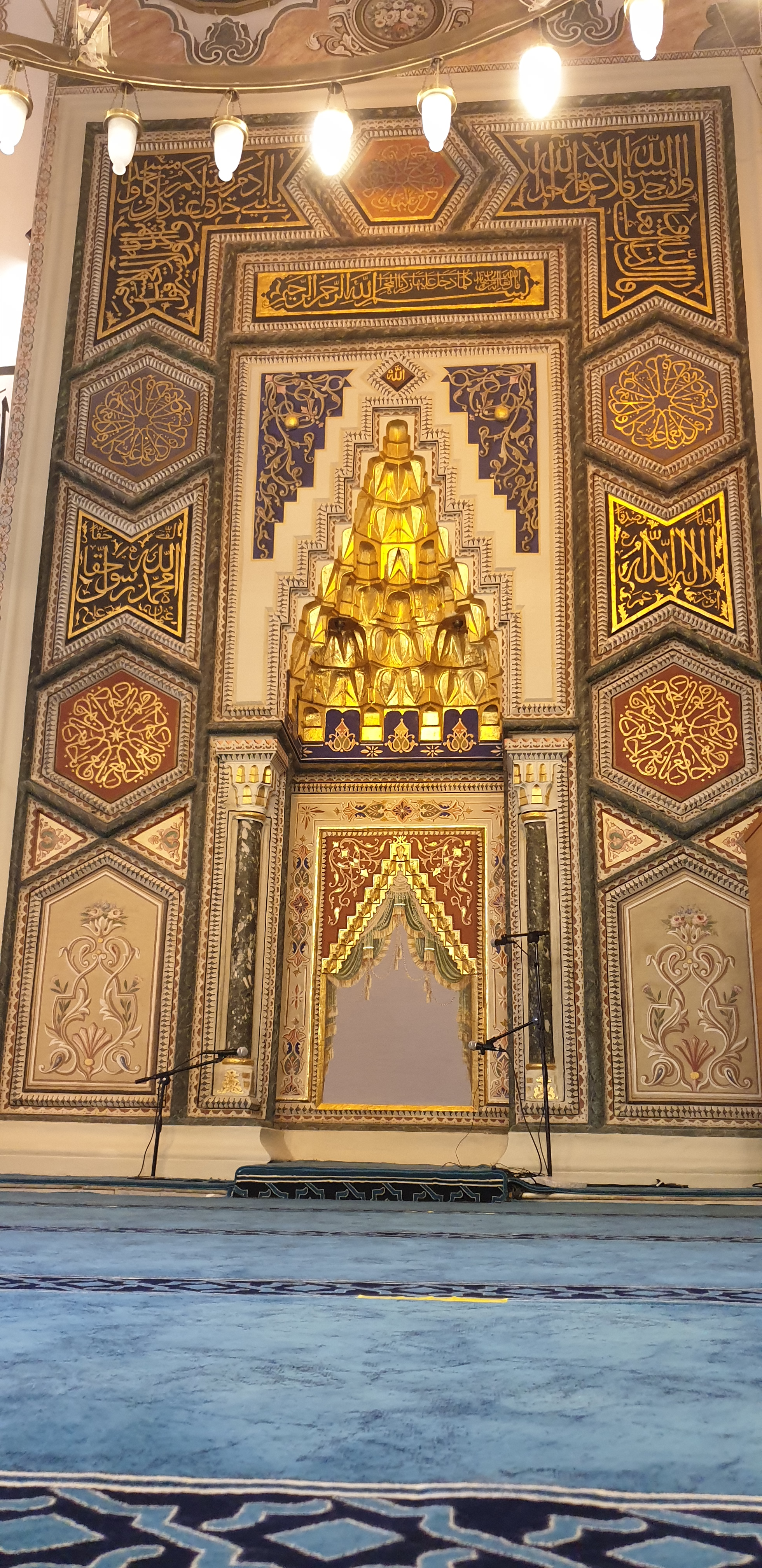 Yıldırım Bayezid Camisi